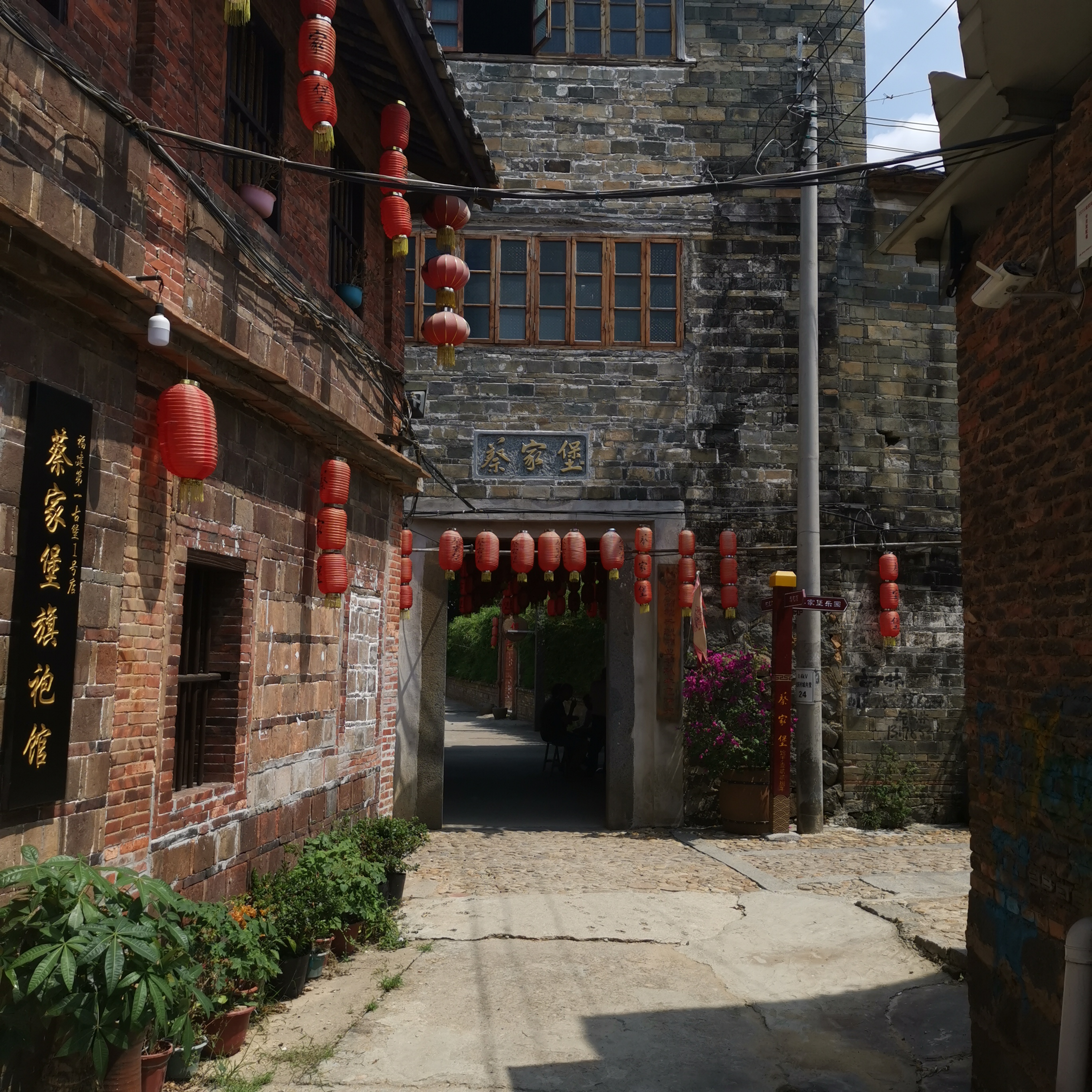 平和县山格镇隆庆村蔡家堡